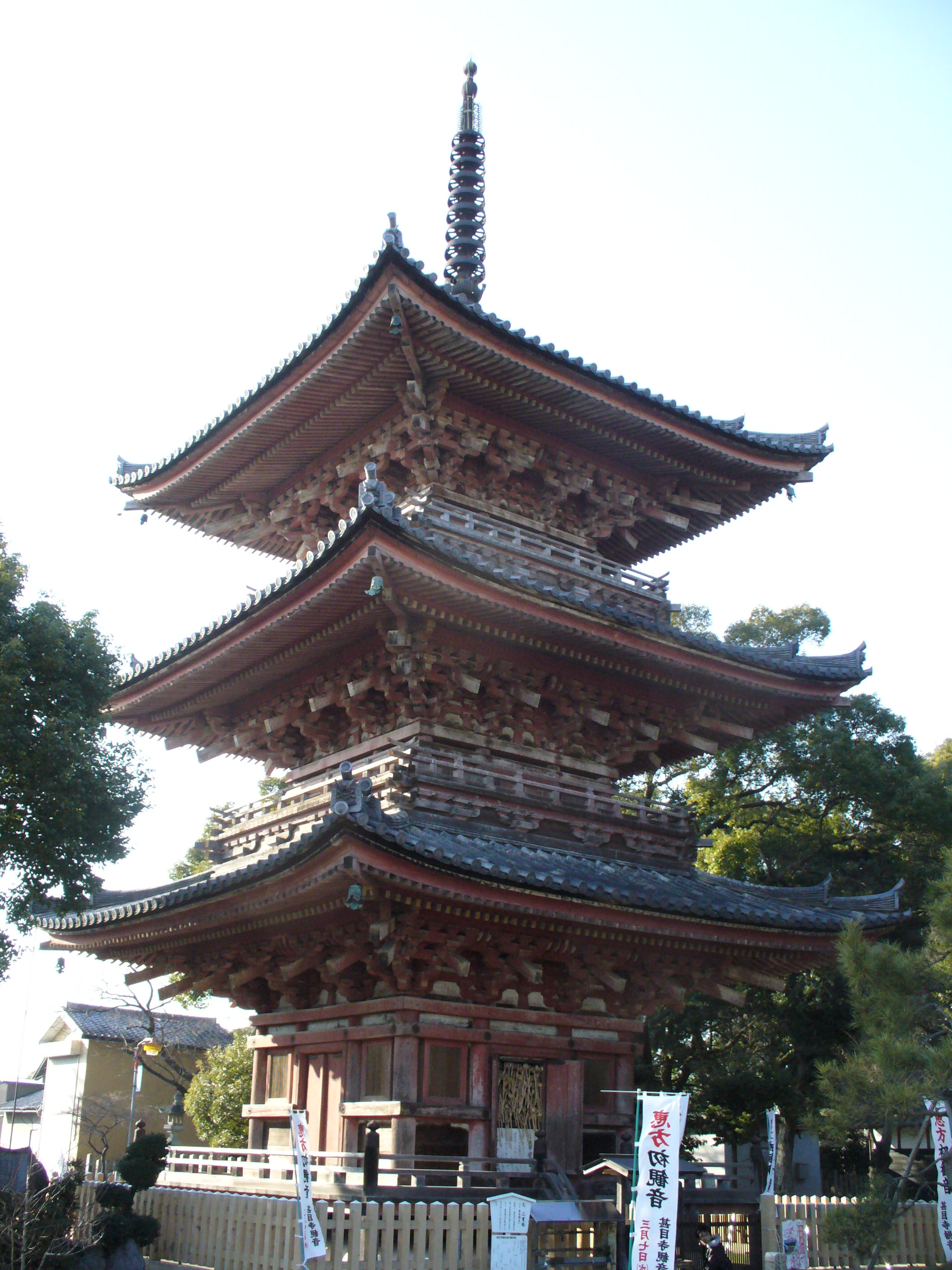 Jimokuji Sanjunoto（甚目寺三重塔）